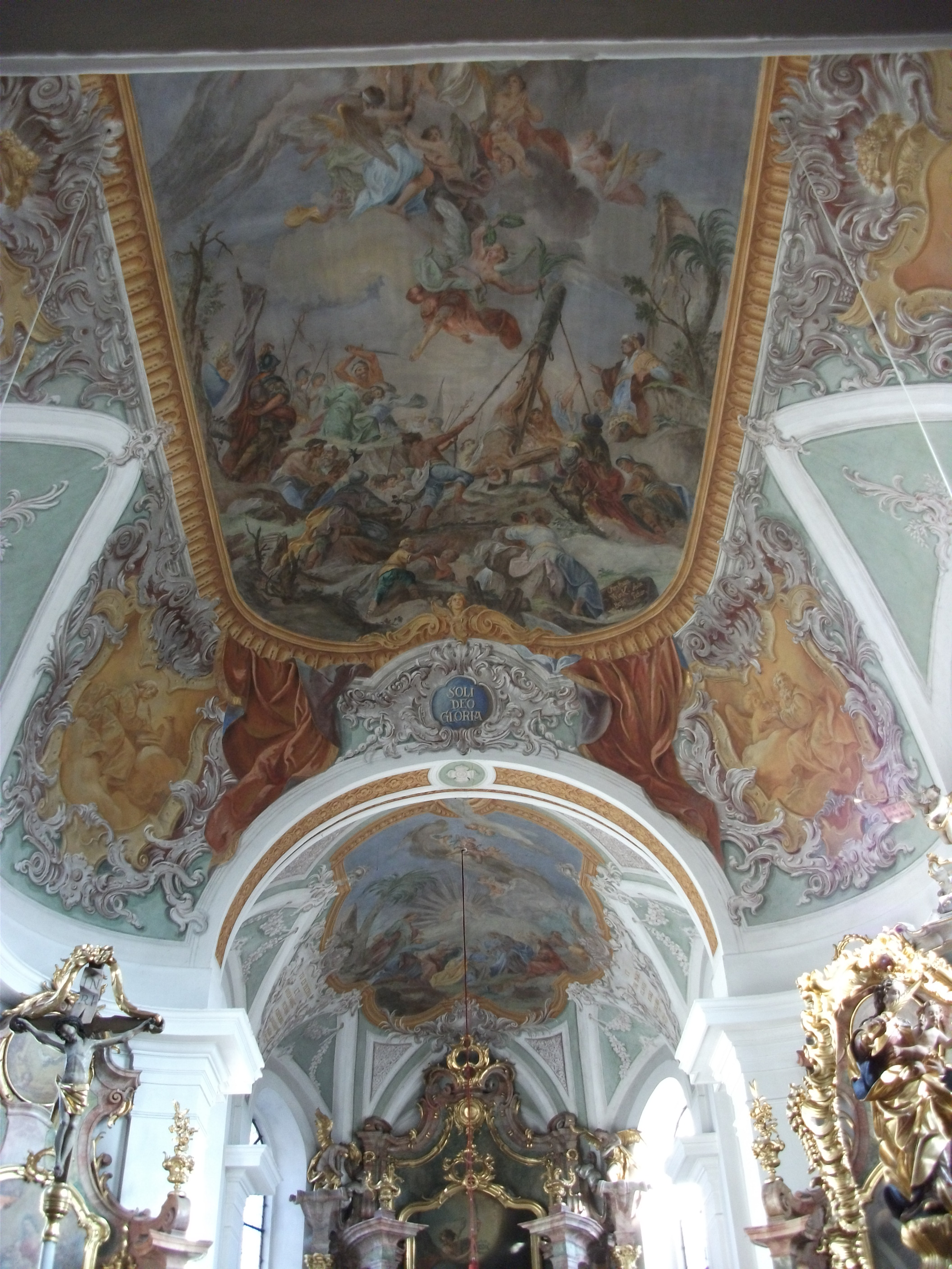 Decke